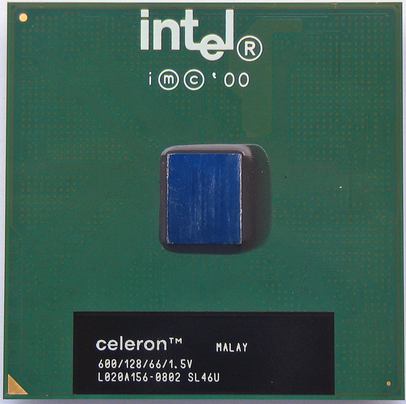 Beschreibung: Celeron "Coppermine 128" 600 MHz Fotograf: Darkone, 26. Juni 2005